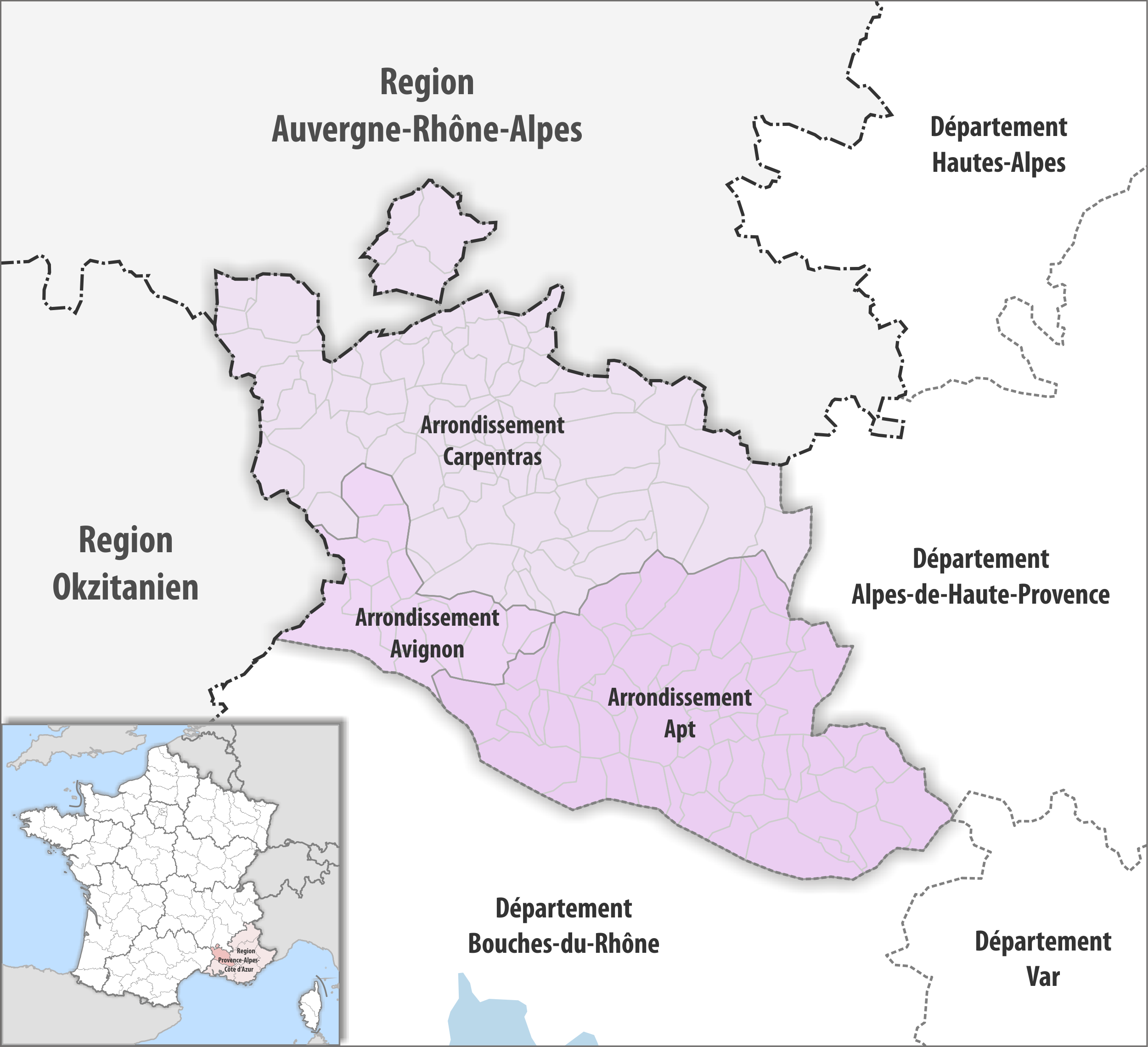 Gemeinden und Arrondissemente im Departement Vaucluse